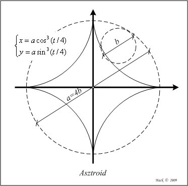 Asztroid